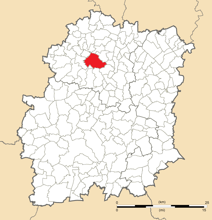 Carte de position de Marcoussis en Essonne (91)